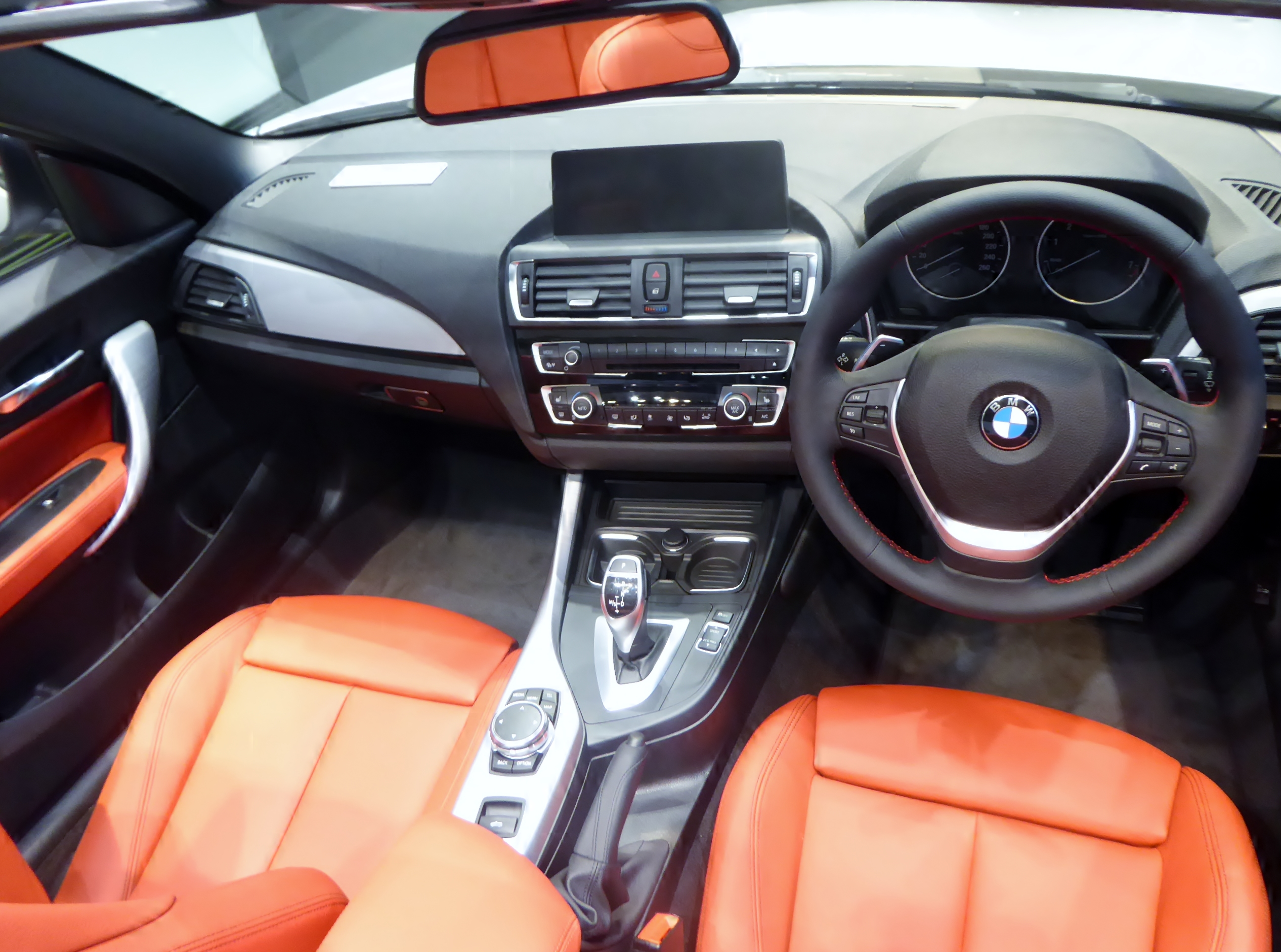 F23型BMW・220iカブリオレスポーツのインテリアを撮影。